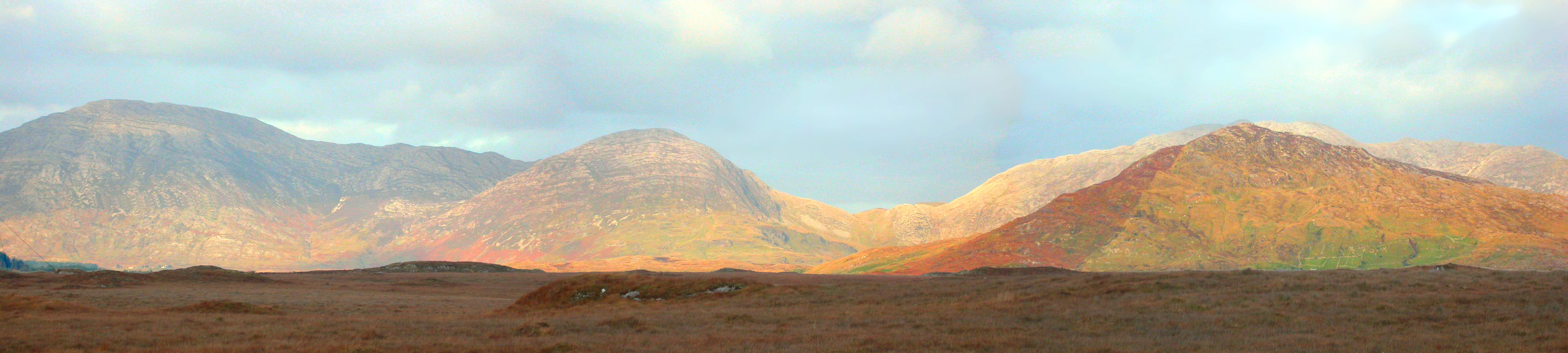 Na Beanna Beola ó Chaiseal, Co. na Gaillimhe.